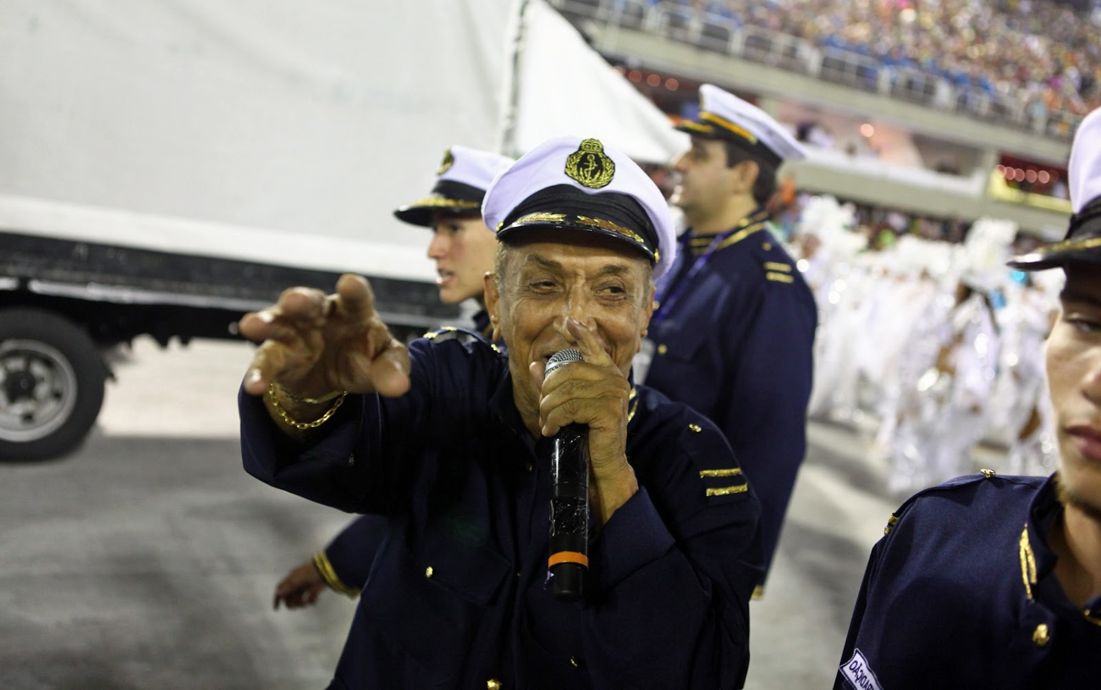 Carnaval 2013 (0958489)